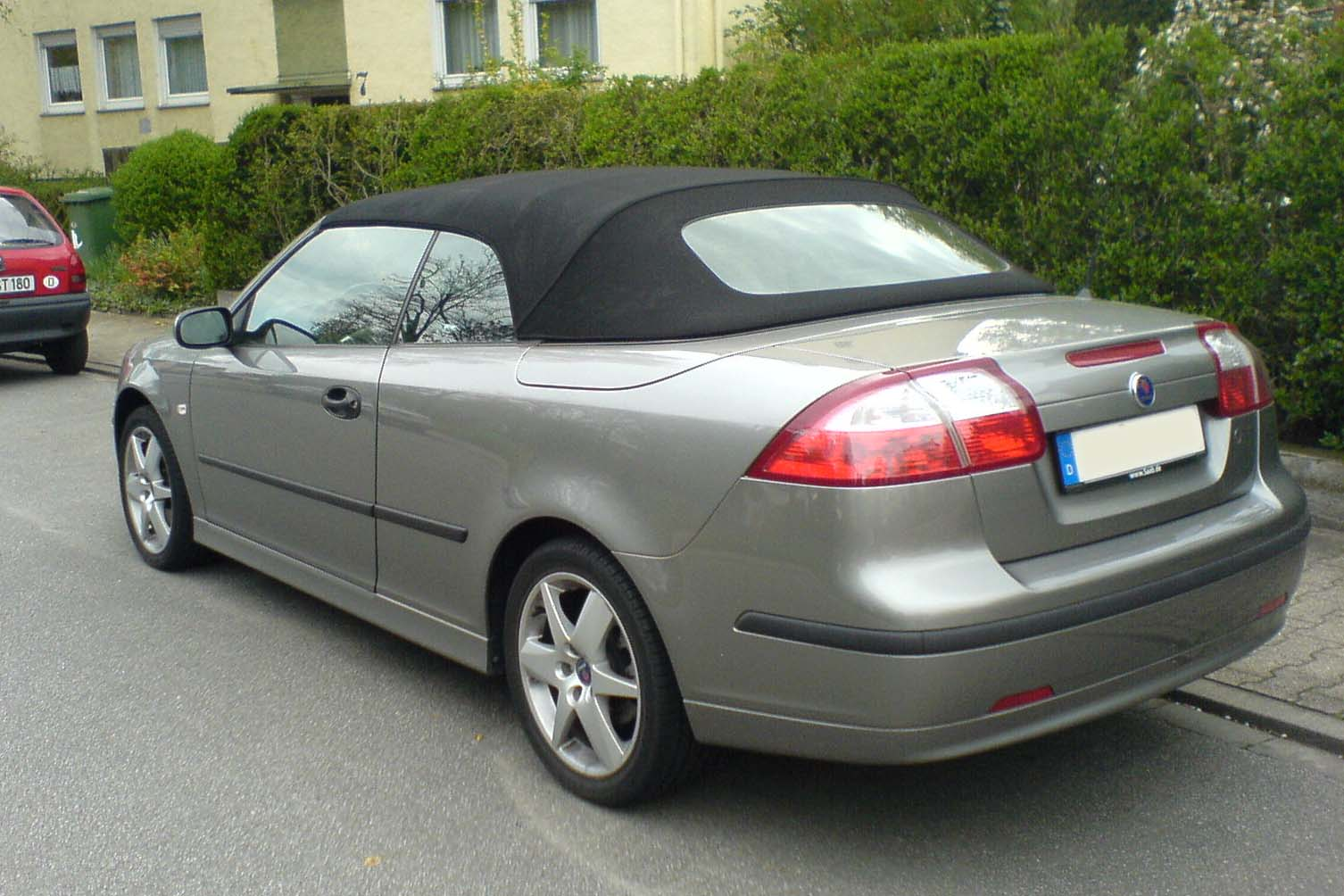 Saab 9-3 Convertible